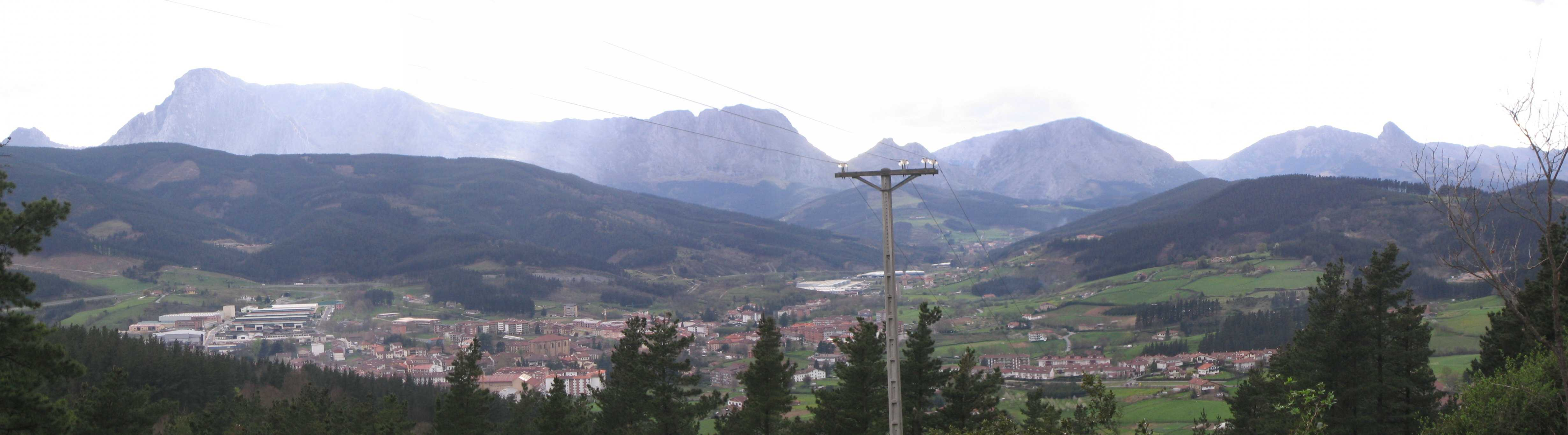 Vista parcial de Elorrio, Vizcaya, País Vasco, España.